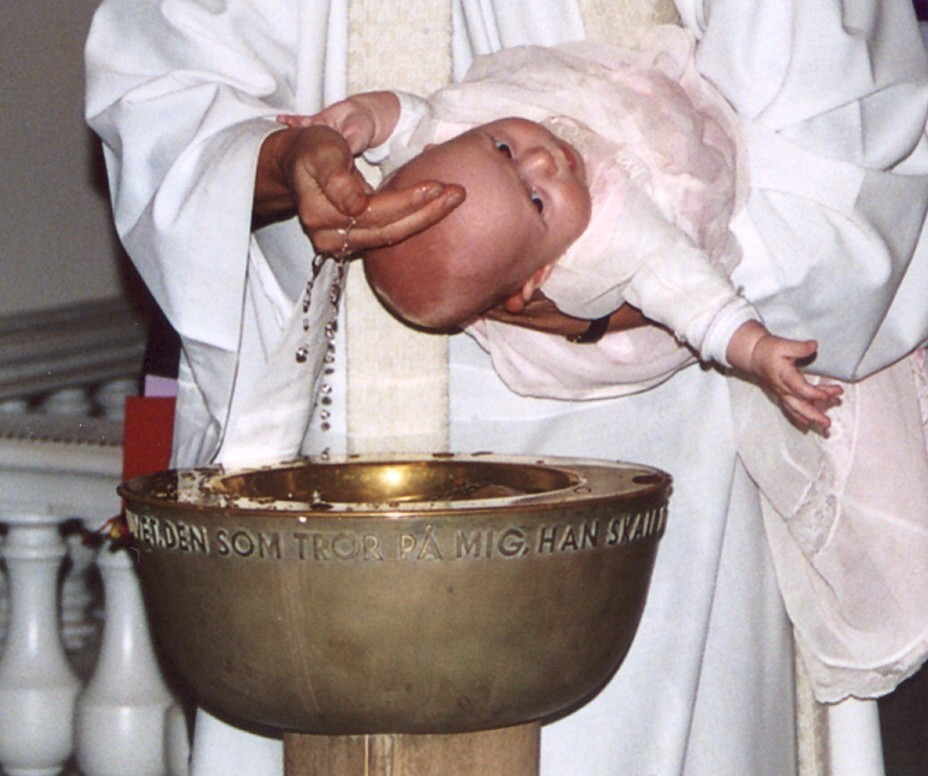 Det ursprunglida dopfundet i "Stora Sköndals kyrka" i Stockholm